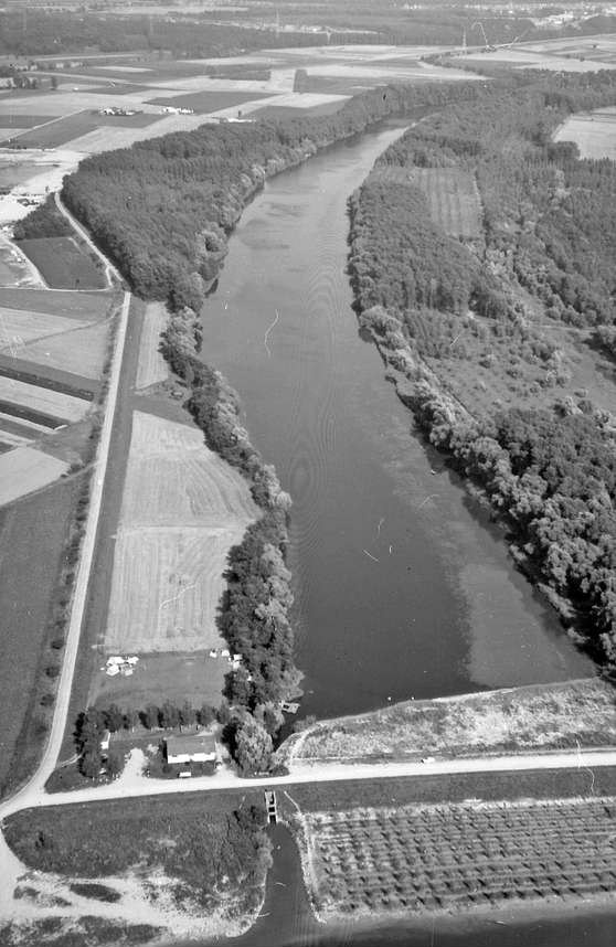 W 134 Sammlung Willy Pragher I: Filmnegative II, Bildordner 311-787 / ca. 1930-1992 Luftbilder [Filmnegative, Ordner 0457] Luftbilder, 1973 Karlsruhe: Anschluss Altrheinarm nördlicher Teil des Rußheimer Altrheins mit Anschluss an den Rhein über die Kurfürstenbauschleuse, daneben Bootshaus der Paddelfreunde Huttenheim